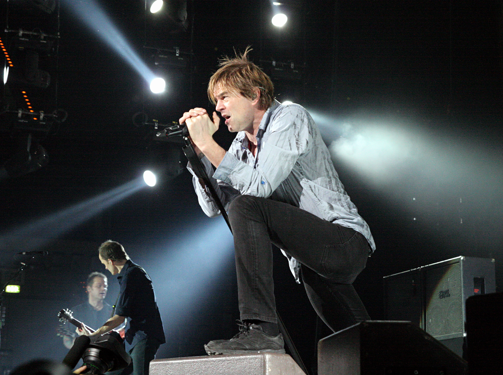 Campino, bürgerlich Andreas Frege, von den Toten Hosen am 15. Dezember 2012 in der SAP Arena in Mannheim.